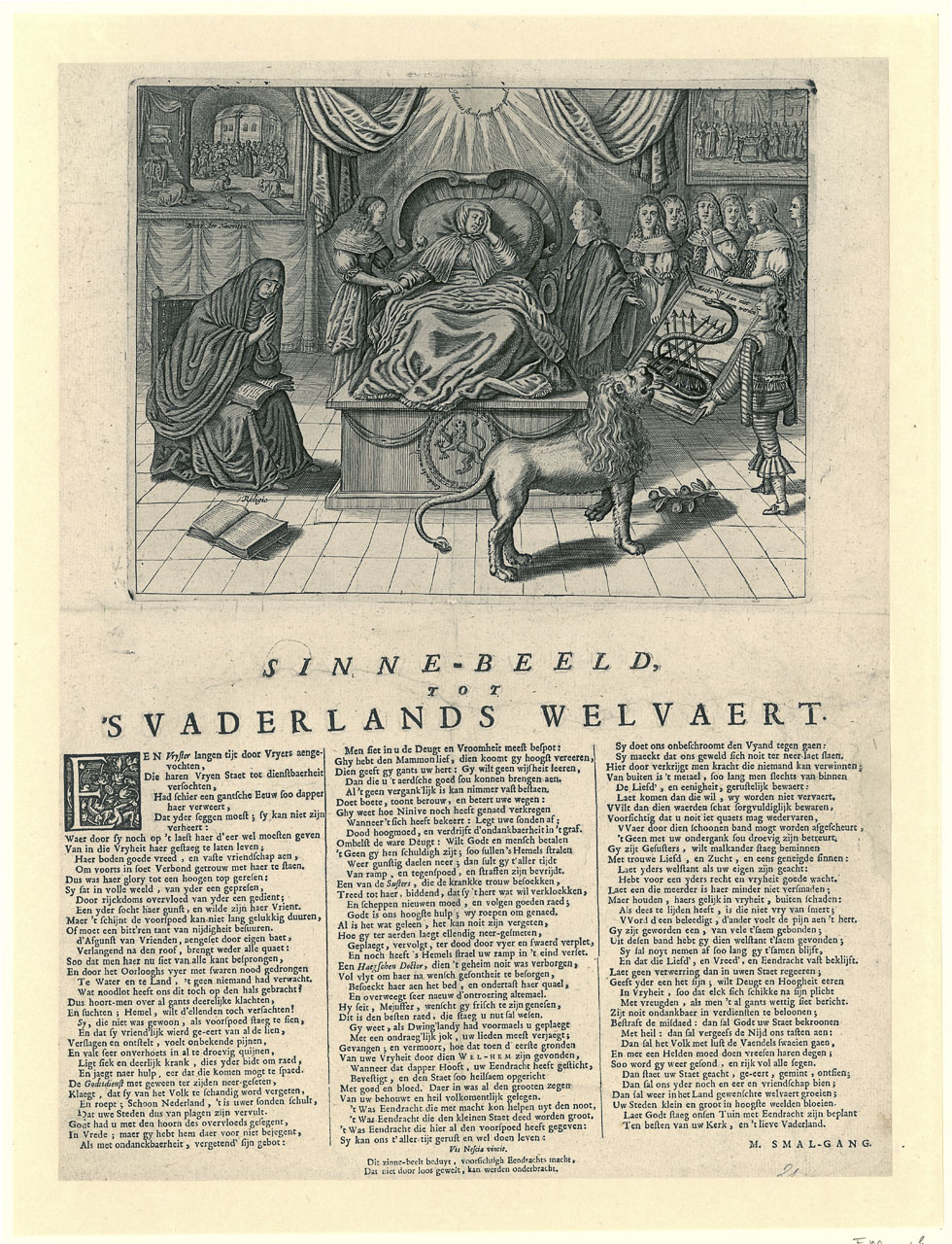 ‘Sinne-beeld, tot ’s vaderlands welvaert’. Engraving and typeset. 44.7 × 33.2 cm. Amsterdam, Rijksmuseum Amsterdam, Frederik Muller Historieplaten. Inventory number RP-P-OB-68.283 Provenance: 1881: purchased by the Rijksmuseum Amsterdam, Amsterdam